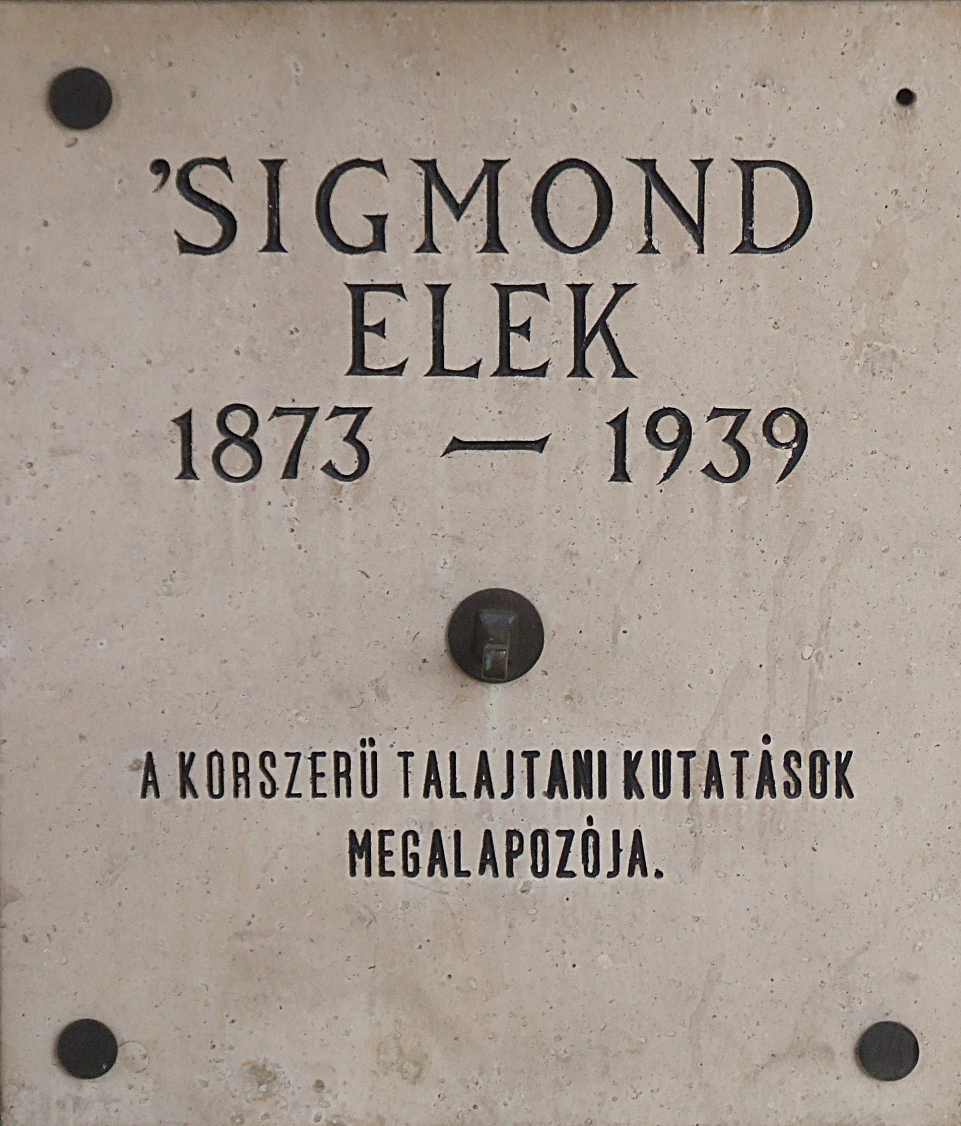 ’Sigmond Elek emléktáblája, Budapest, V. kerület, Kossuth tér 11.